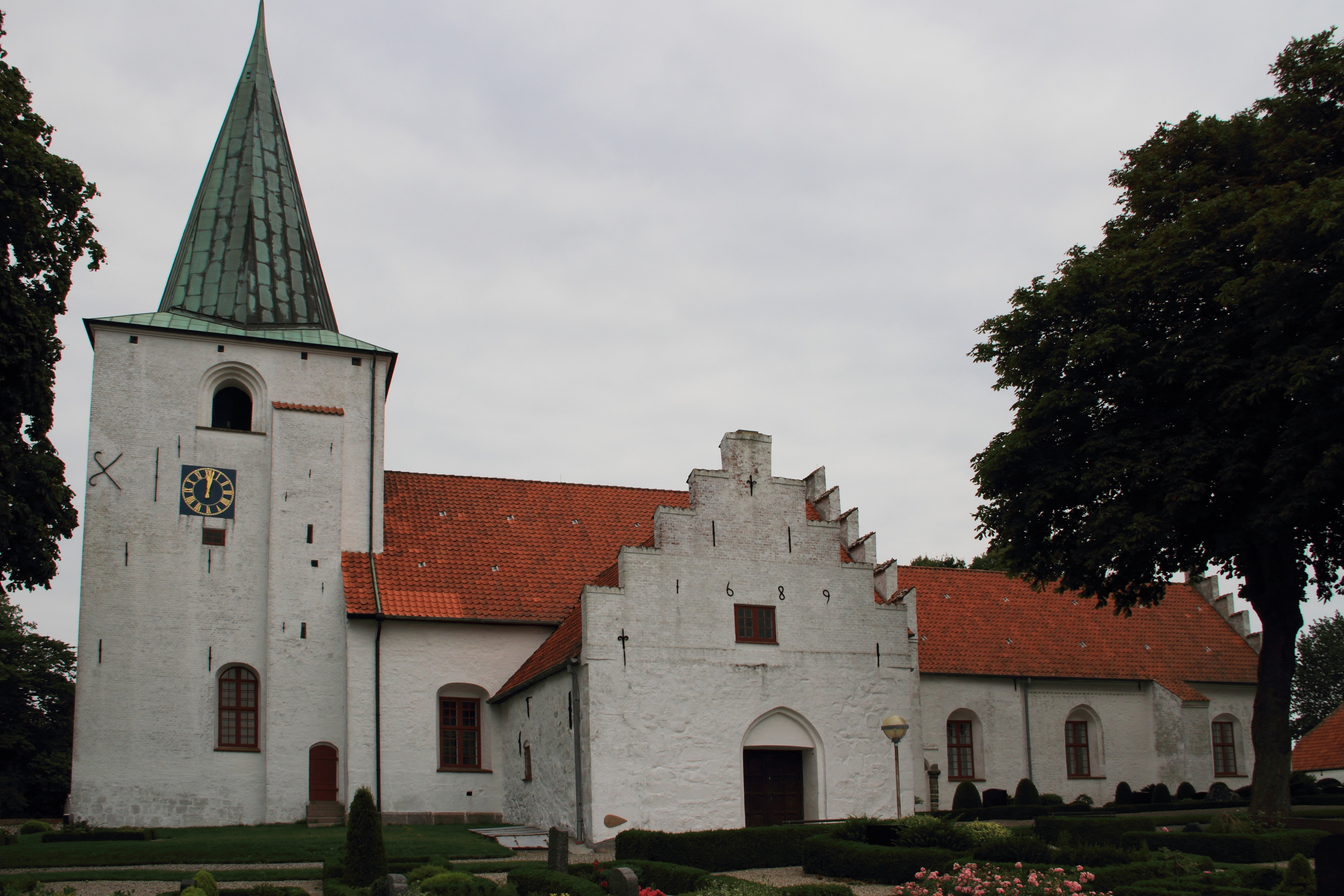 Die Rise Kirke auf der dänischen Insel Ærø.